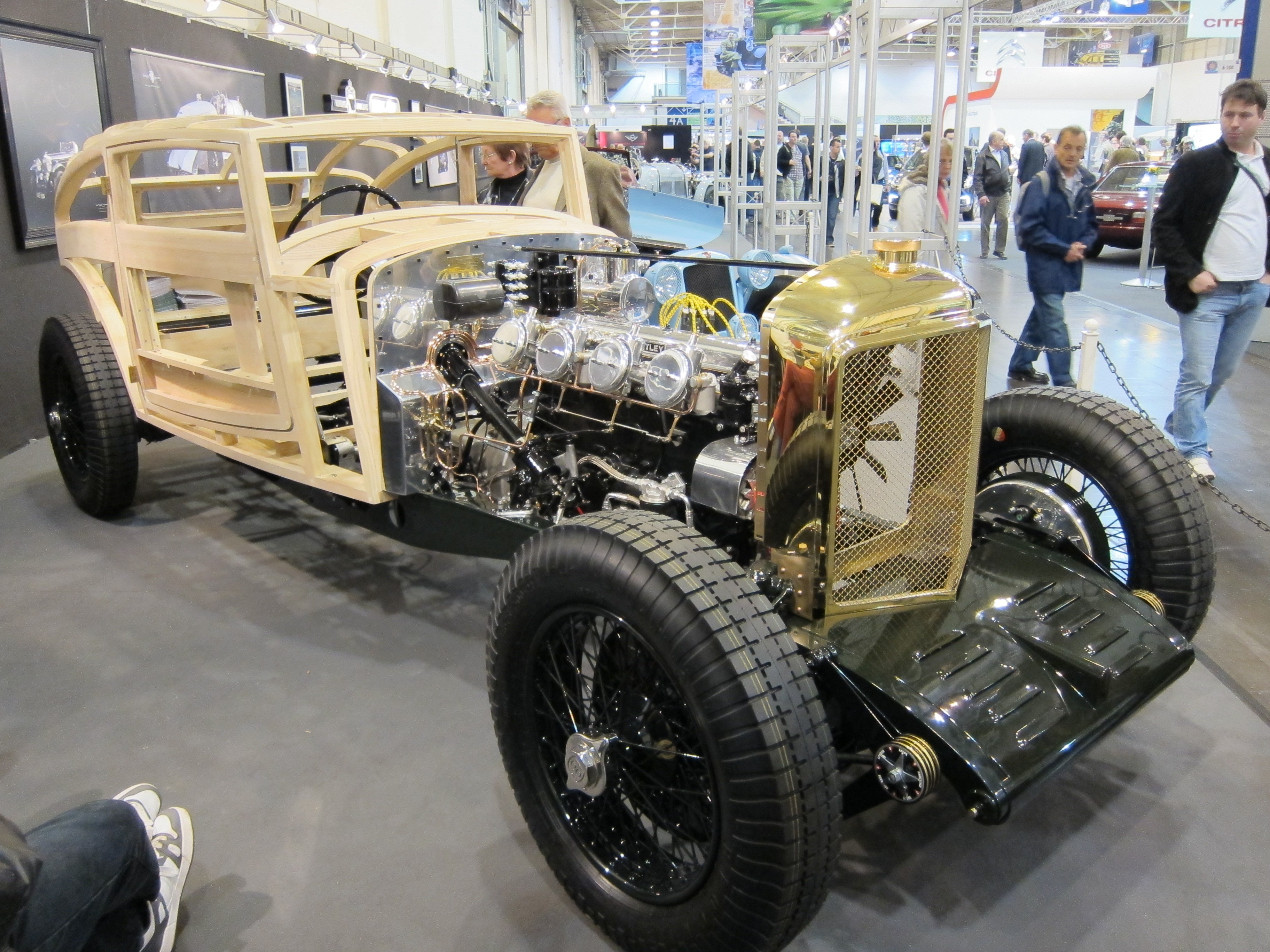 Techno Classica 2011